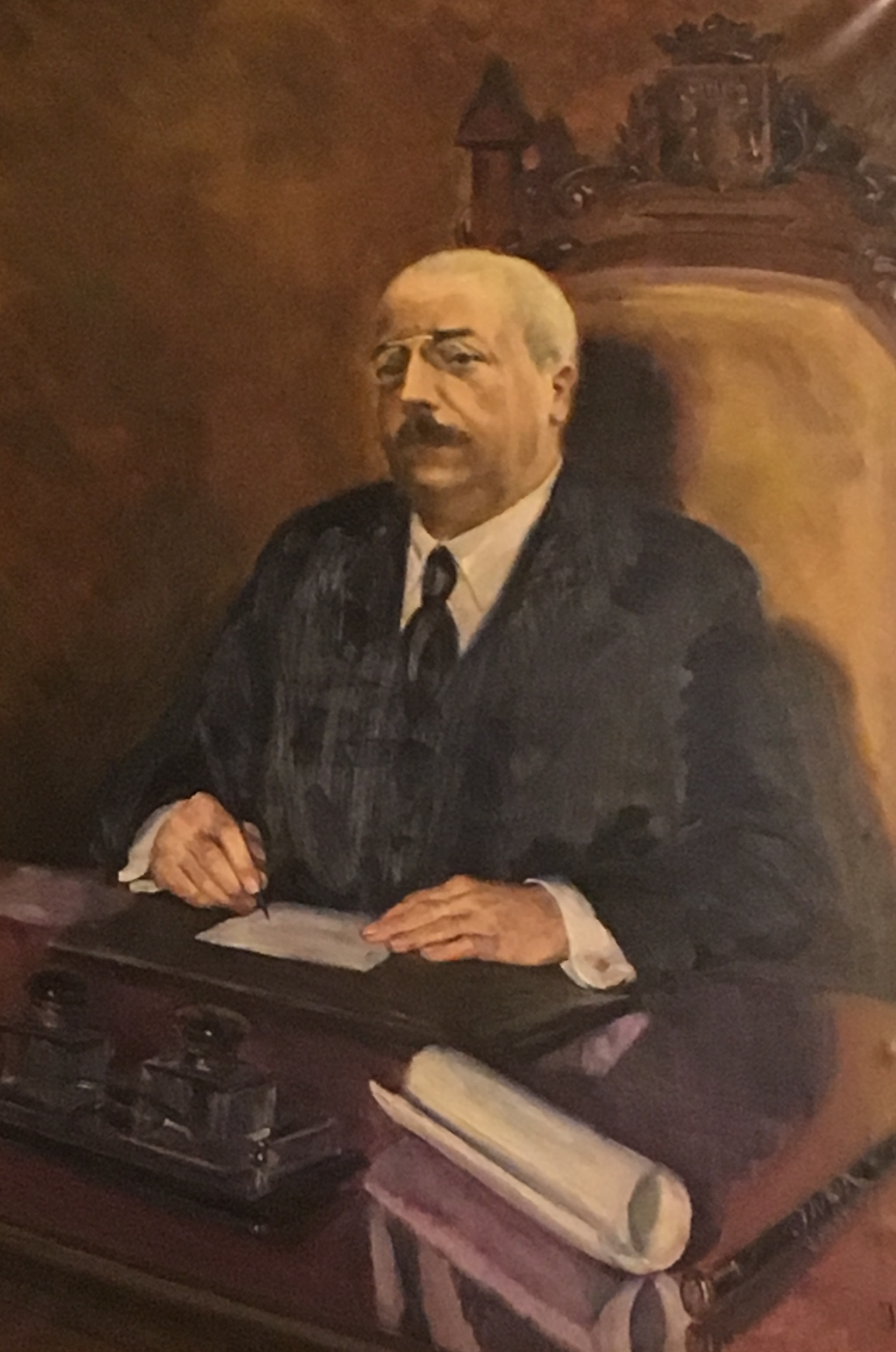 Retrato de Juan Álvarez de Sisternes, alcalde de Villafranca del Panadés entre 1925 y 1930.